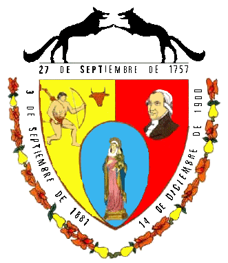 Escudo del municipio Roscio. Estado Bolívar. Venezuela